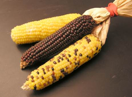 Kukuřice